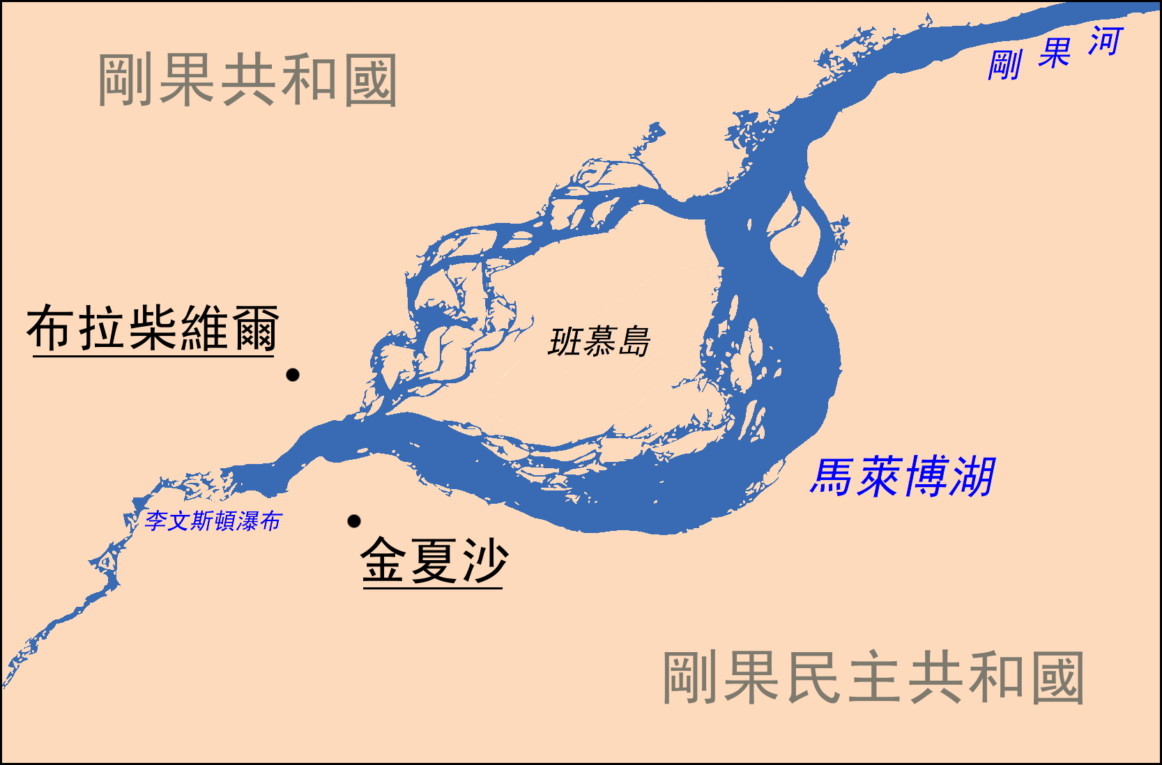 馬萊博湖。